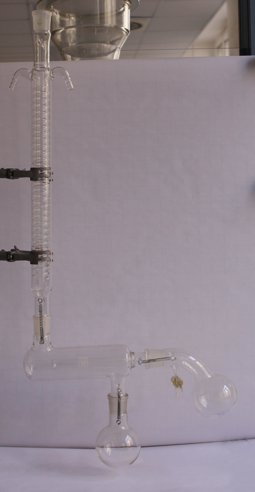 Eine Trockenpistole nach Abderhalden mit Glassicken und Federn